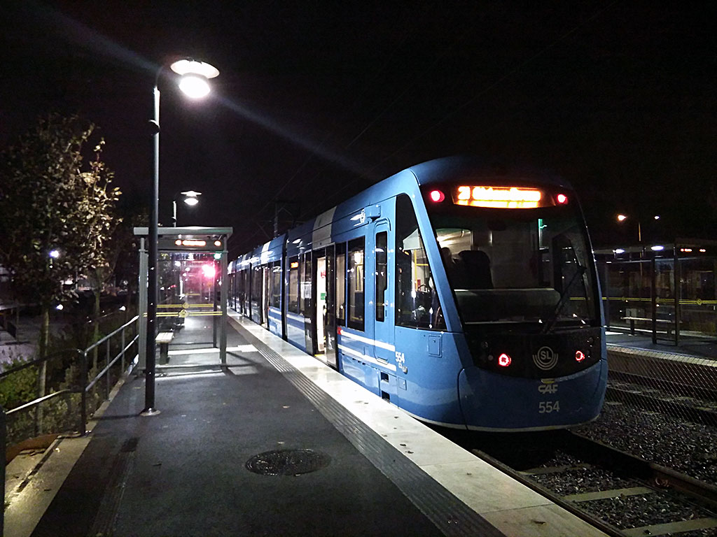 CAF Urbos 75 A36 554 på AGA holdeplass på Lidingöbanan